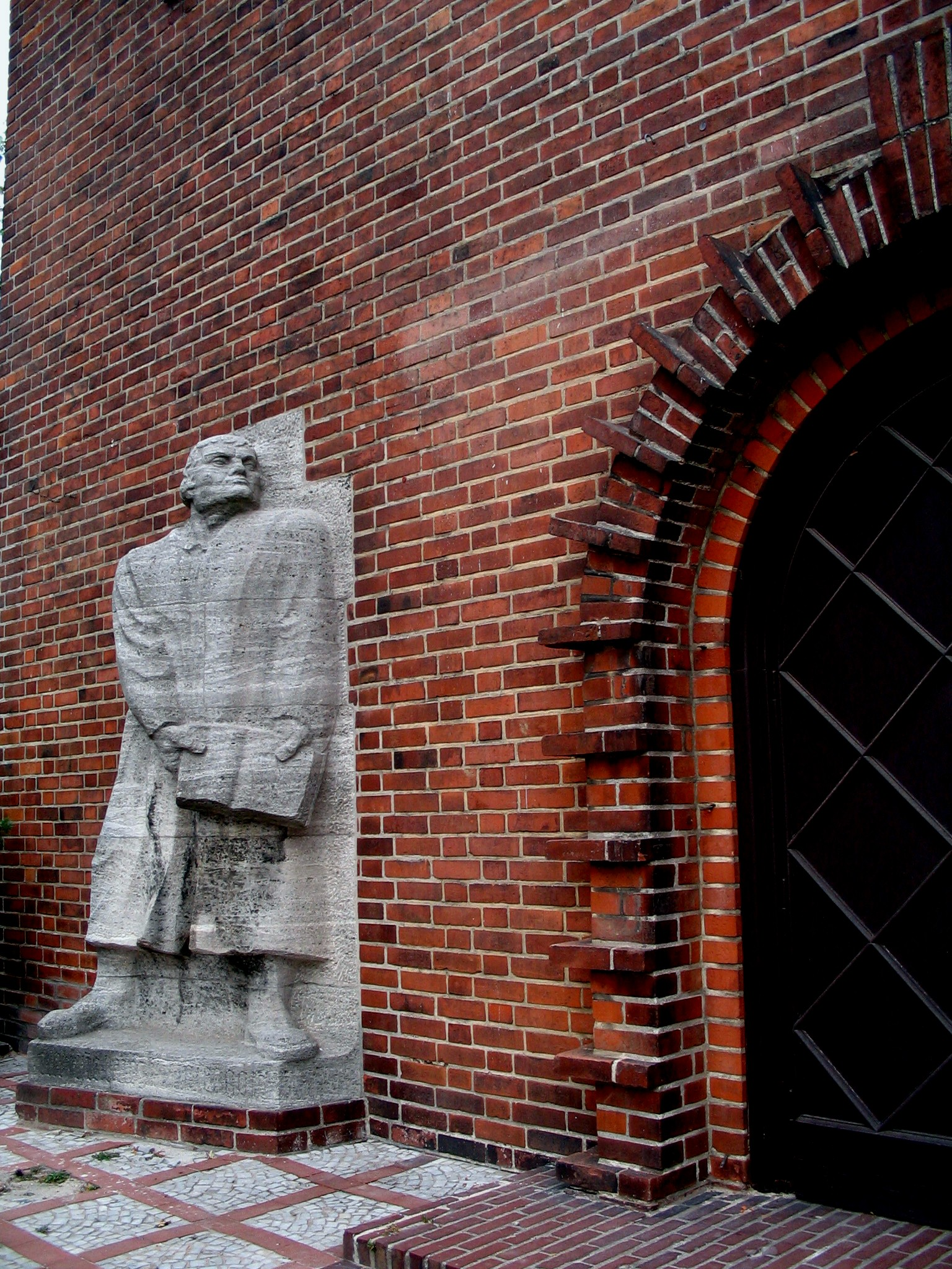 Lutherdenkmal an der Lutherkirche Lübeck (eigenes Photo)